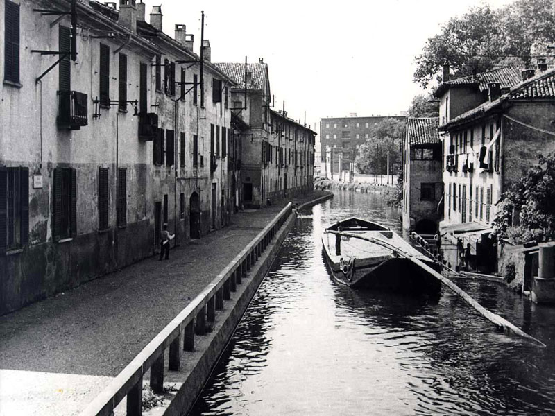 Milano ieri e oggi (vedi fotocolor dello stesso luogo oggi). Un barcone scivola scivola sulla Martesana verso Milano.